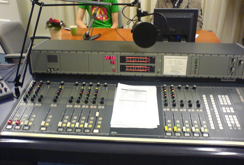 Tafel van HTR Radio